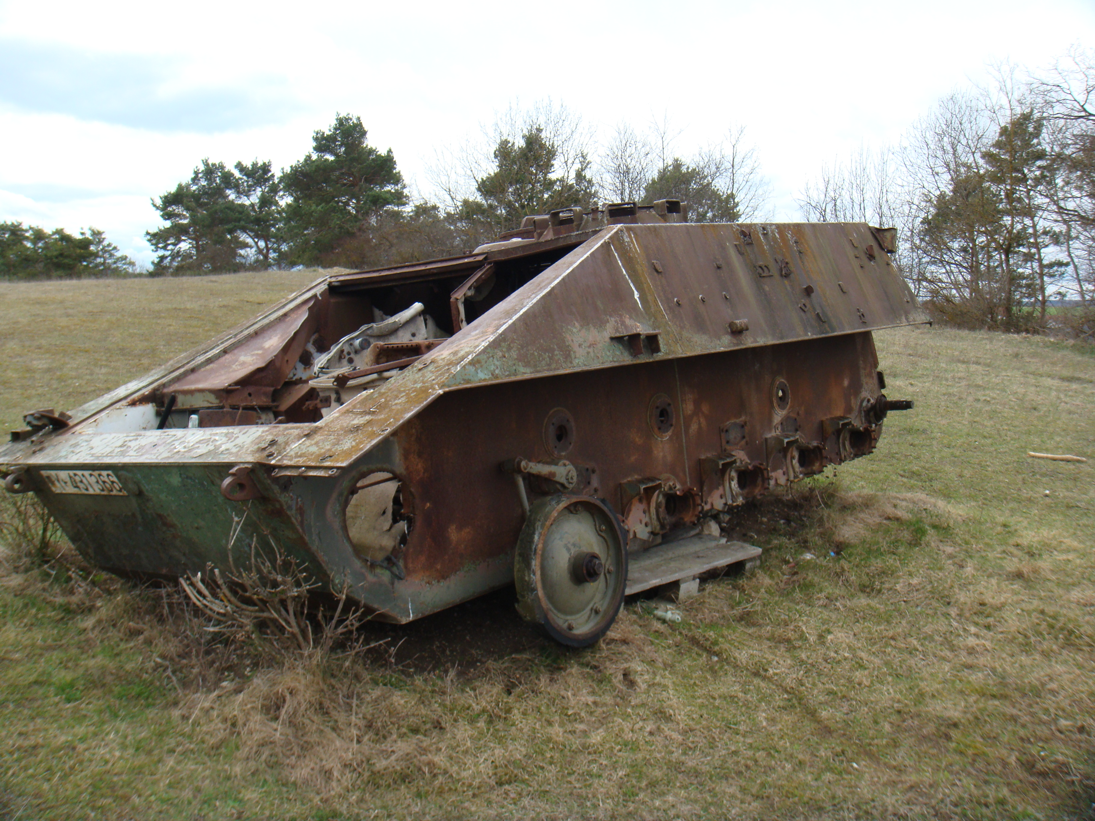 Wrack Spz kurz Beobachter, das Wrack wurde von Ersatzteildieben ausgeschlachtet und steht auf dem Standortübungsplatz der Erwin Rommel Kaserne in Dornstadt